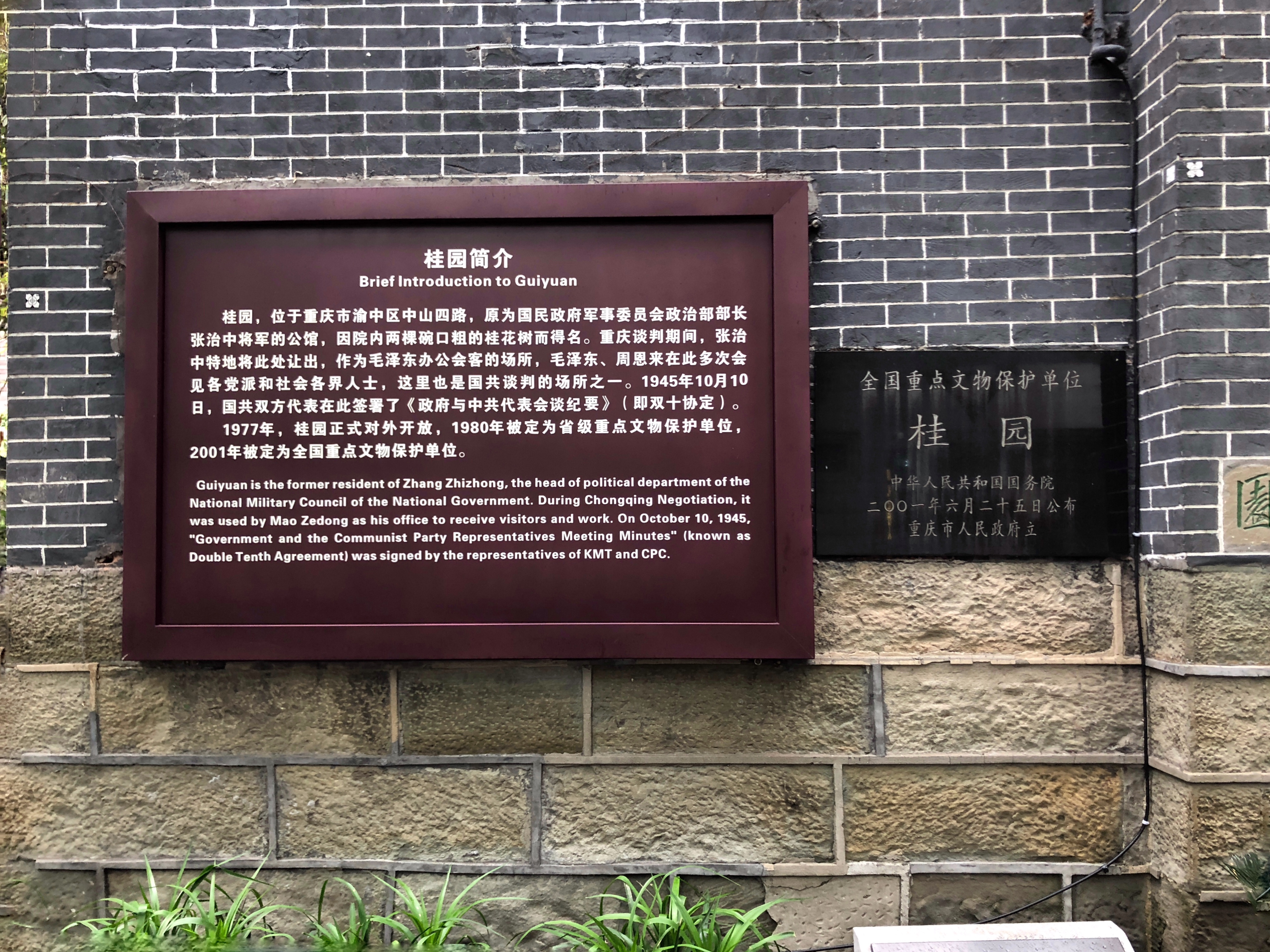 桂园门牌介绍